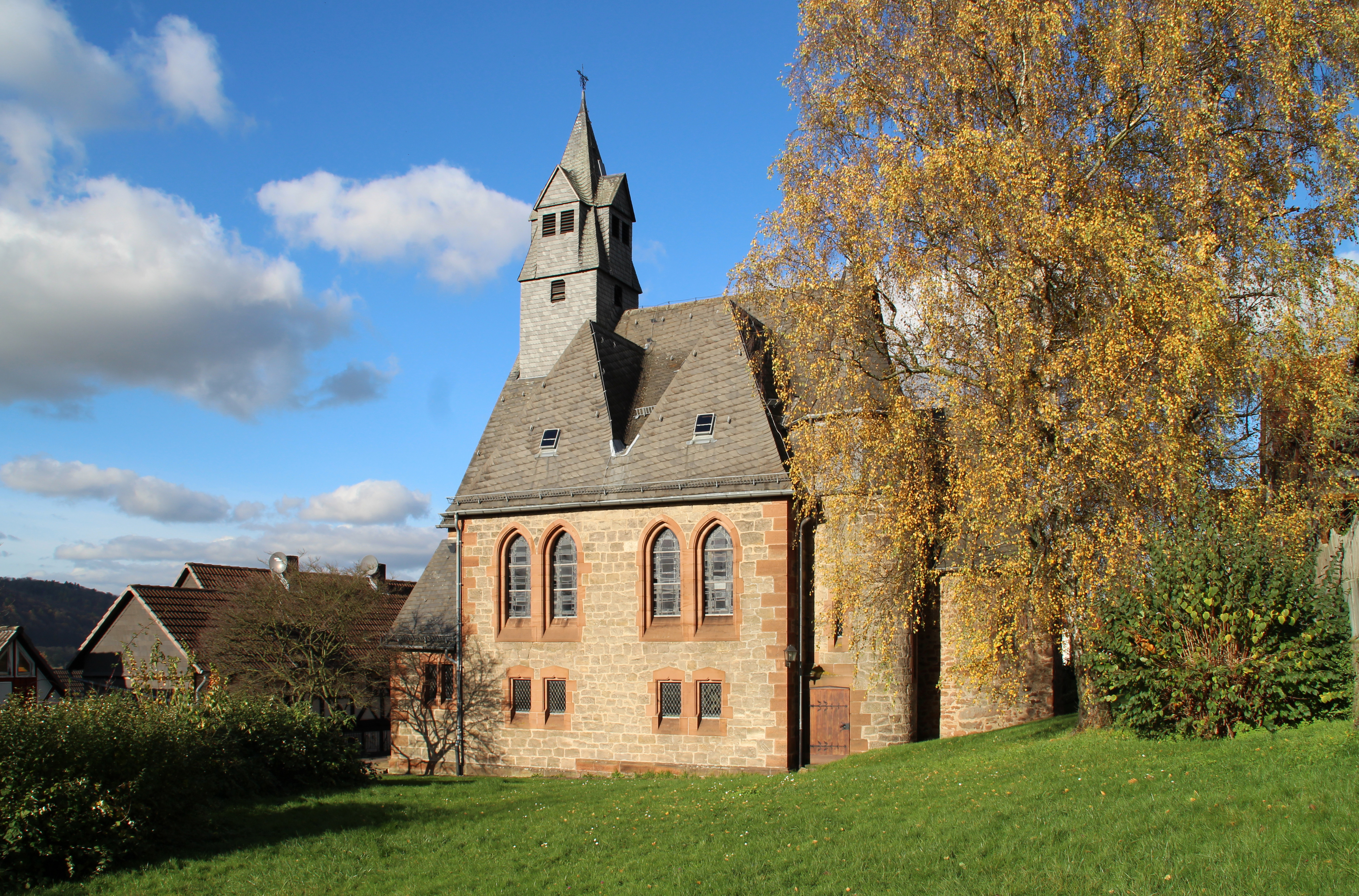 Kirche